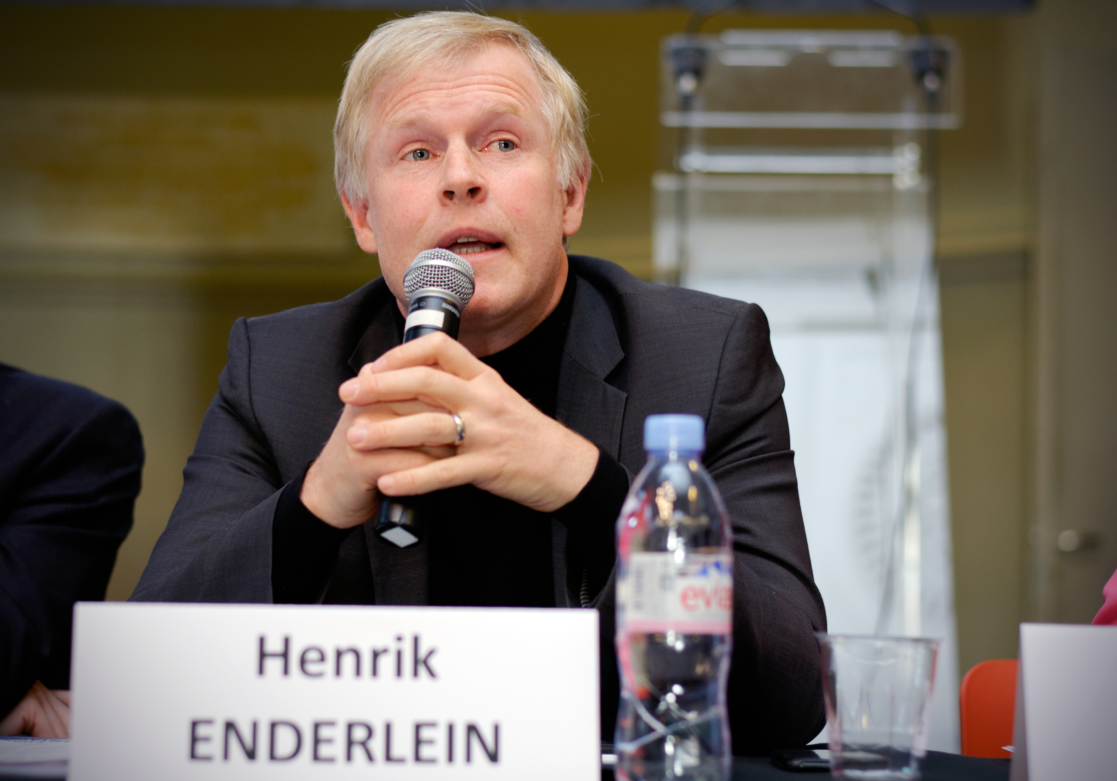 Henrik Enderlein - Comité européen d'orientation de l'Institut Jacques Delors - Paris 9 décembre 2017